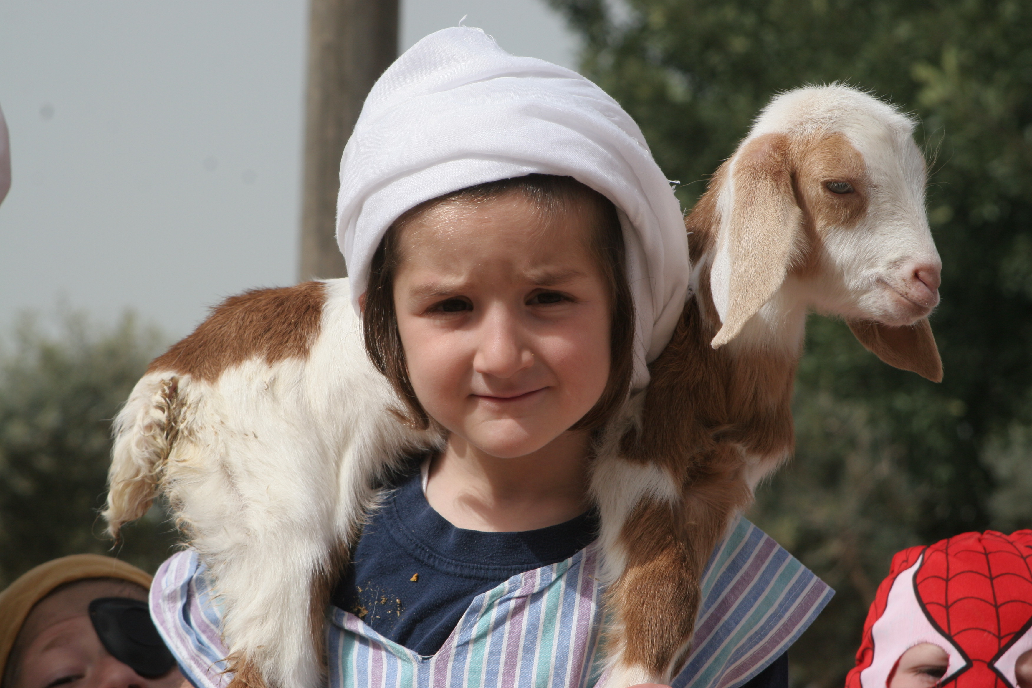 פעילות צאן חווייתית בכפר קדם